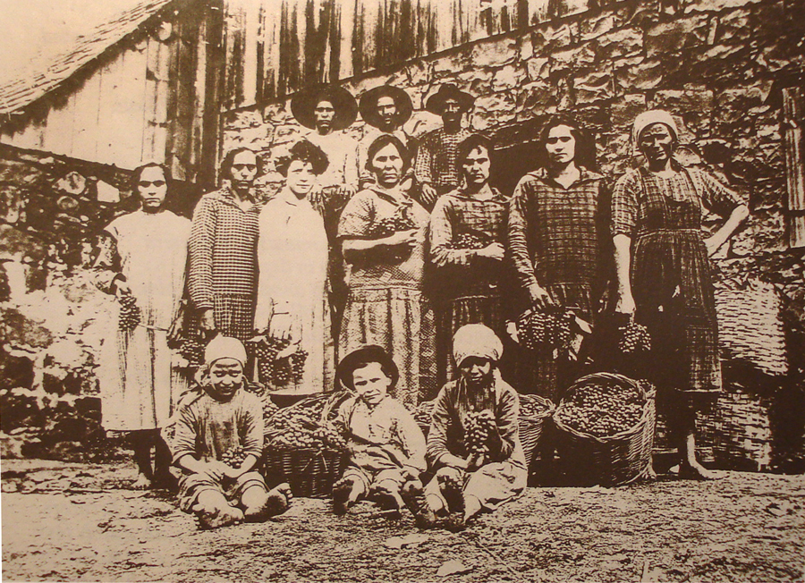 Colonas italianas